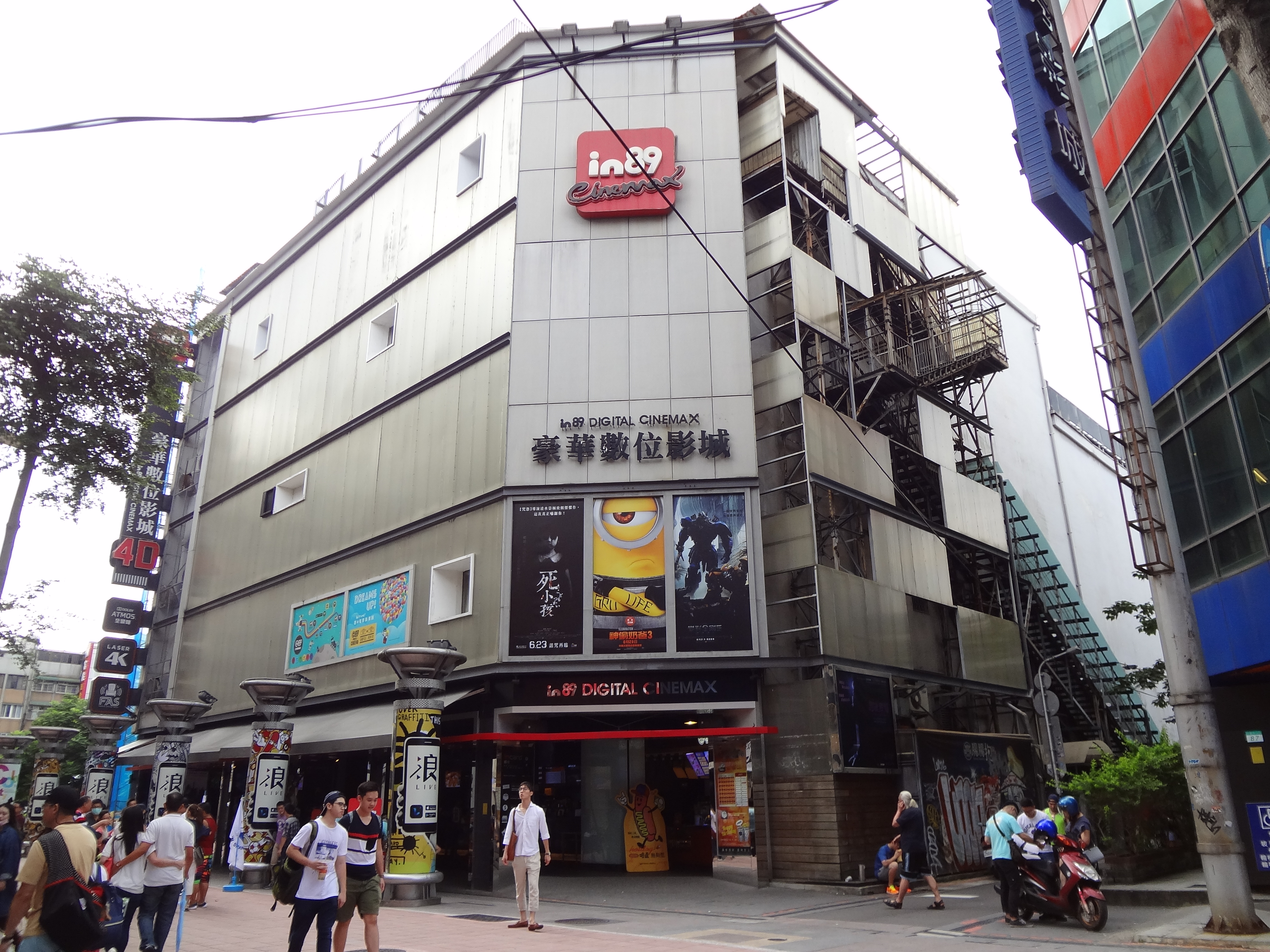 台北西門in89豪華數位影城，地址：臺北市萬華區武昌街二段89號。